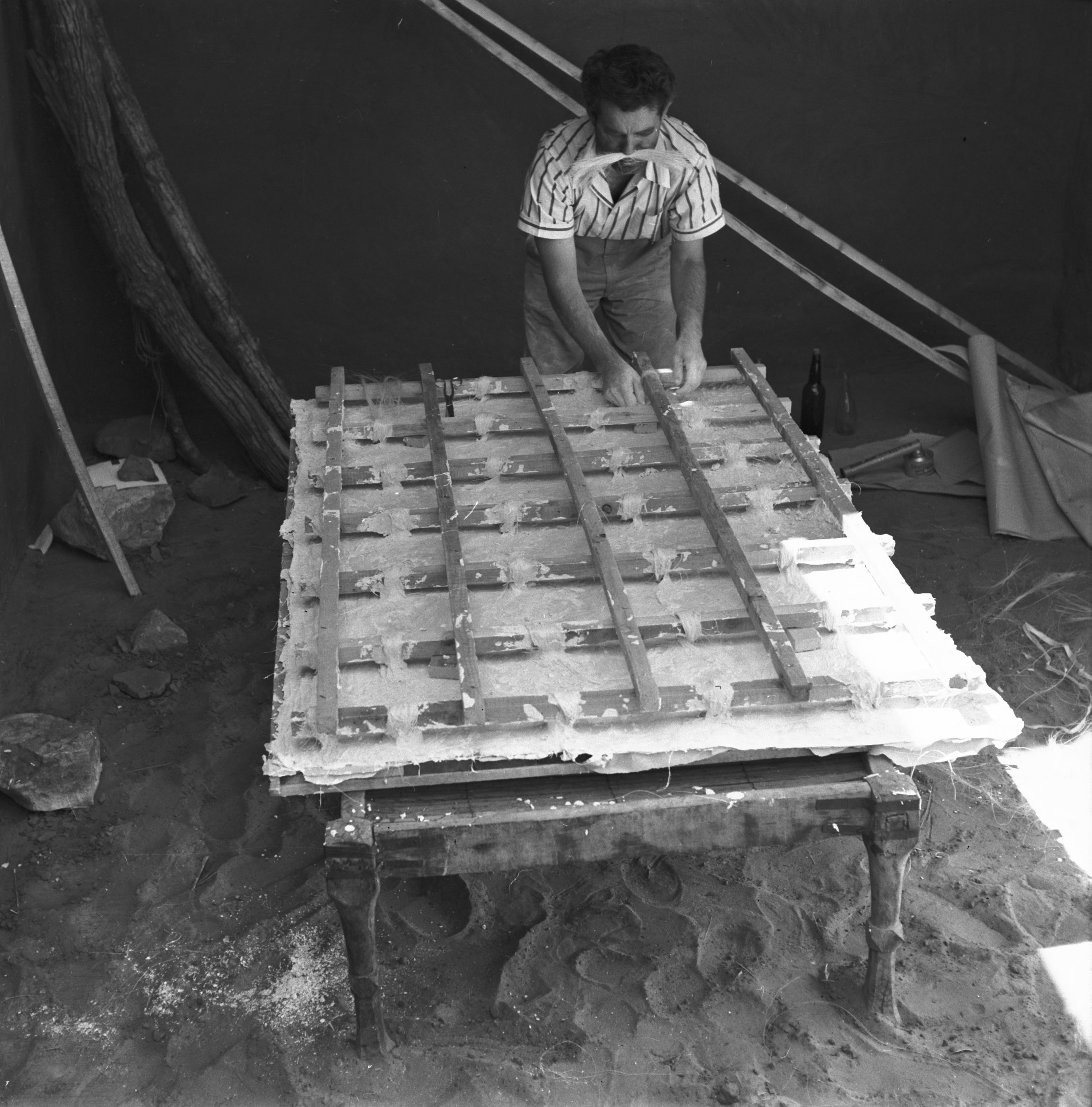 Wykopaliska w Faras